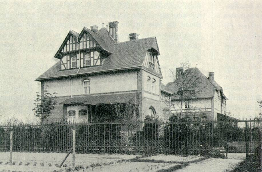 Botanical Garden in Berlin Native nameBotanischer Garten, Berlin-DahlemLocationBerlinCoordinates52° 27′ 18″ N, 13° 18′ 12.96″ E Established1899Website